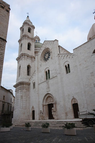 Facciata principale dell'ex Cattedrale di Bitetto